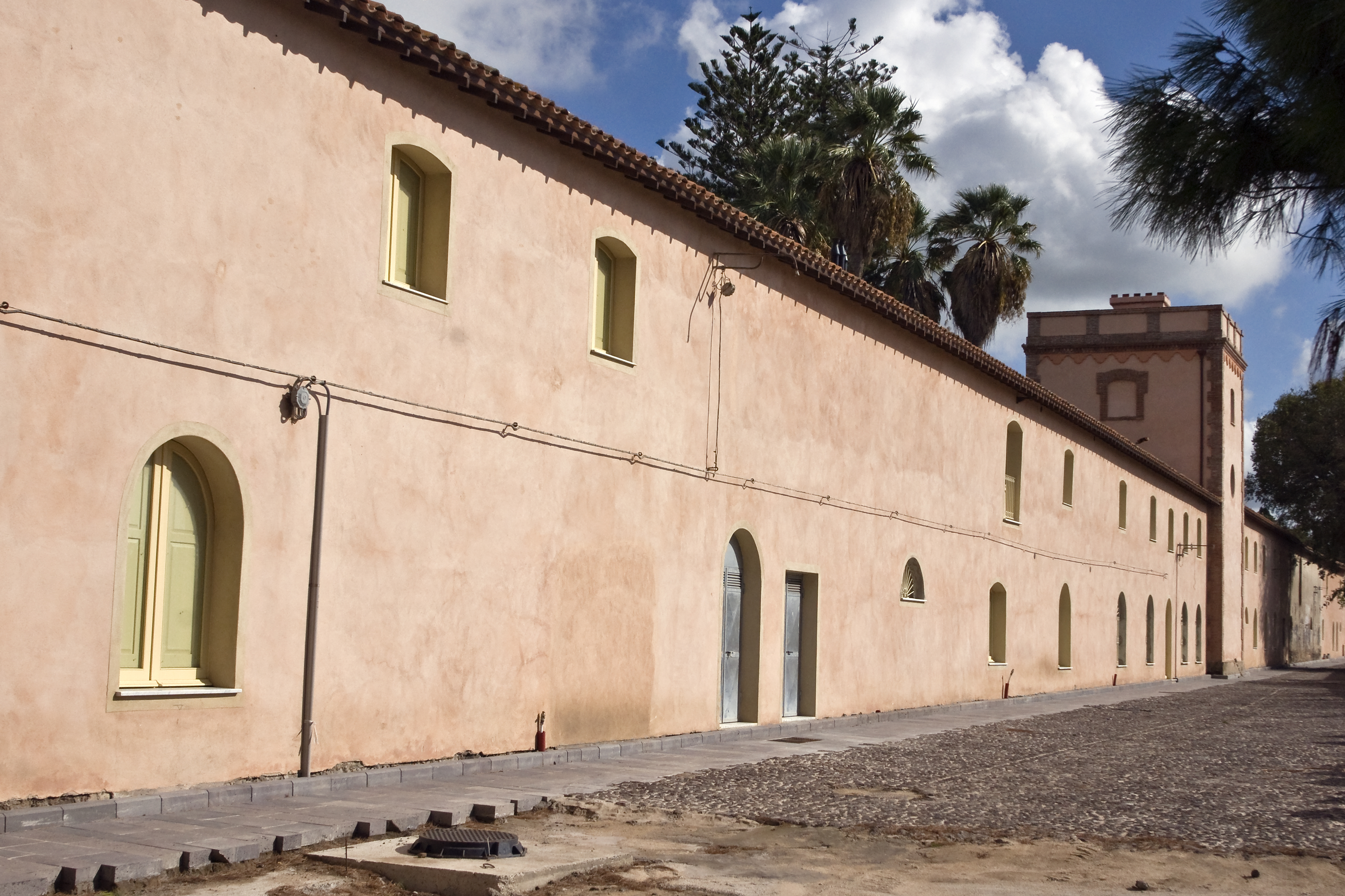 centro turistico,albergo,ristorante "villa Pernis"